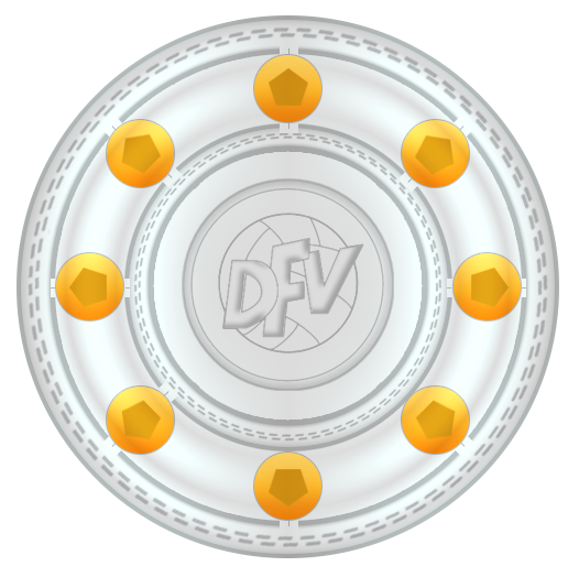 DDR meisterschale